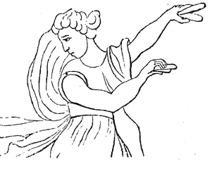 Crotalum